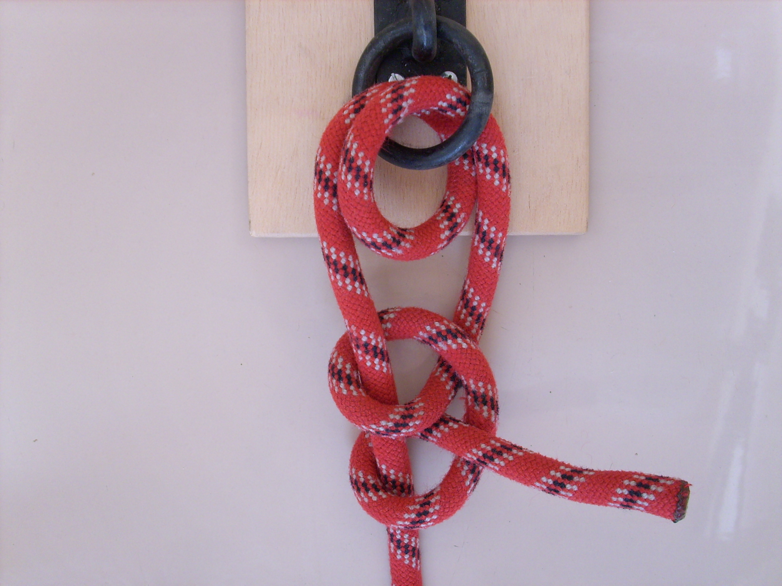 (Anderthalb) Rundtörn mit zwei halben Schlägen